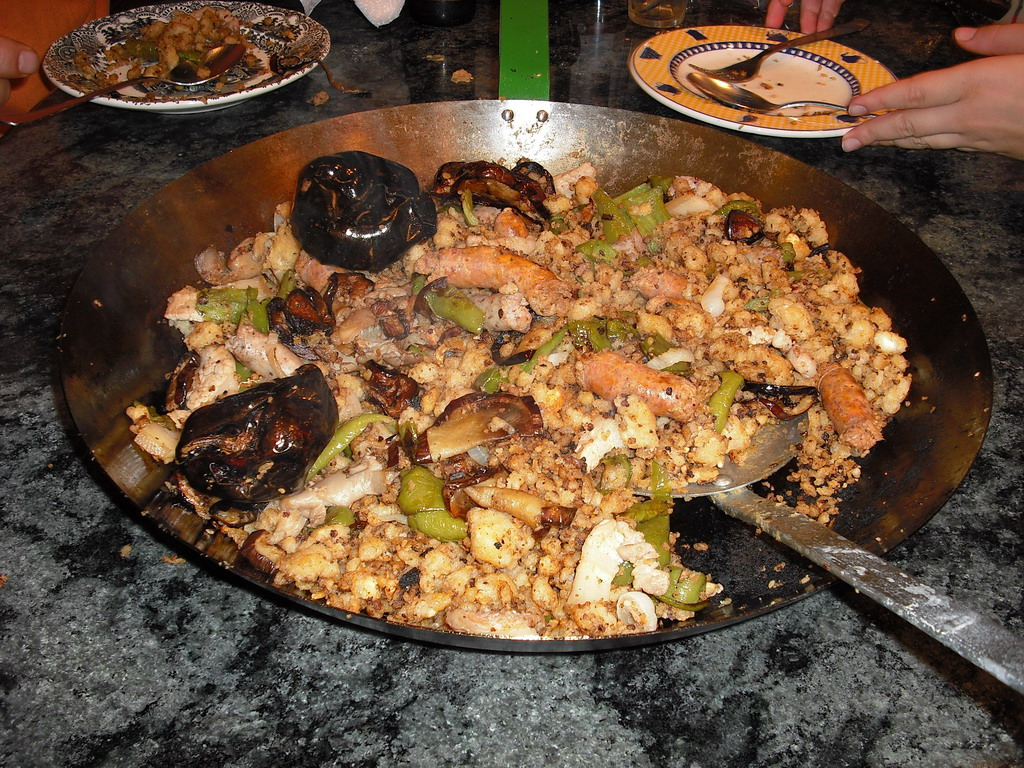 Foto de migas murcianas